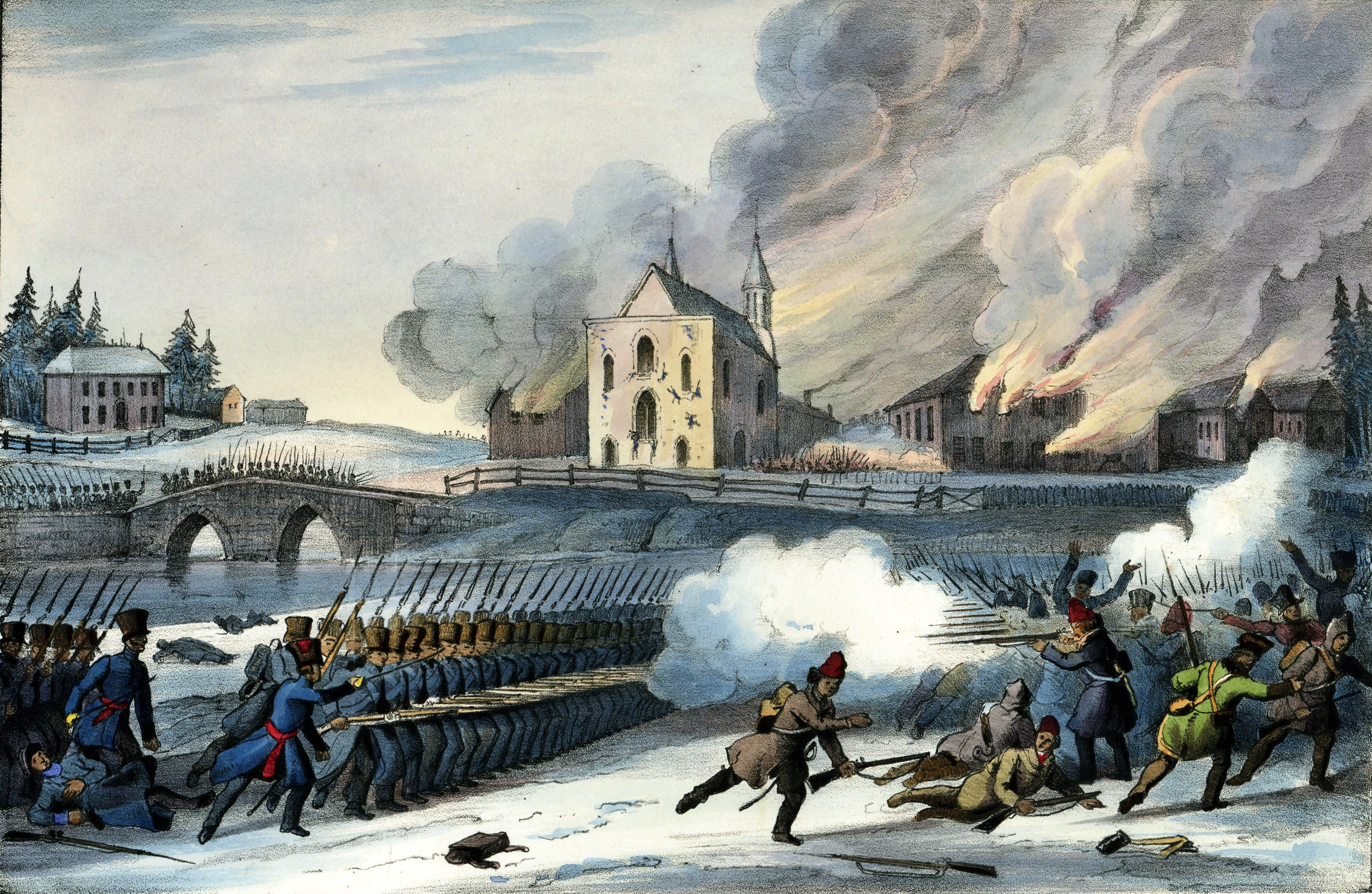 Estampe. Vue arrière de l'église Saint-Eustache et dispersion des insurgés. Encre et aquarelle sur papier - Lithographie (26.5 x 36.6 cm). Bataille de Saint-Eustache, 14 décembre 1837 lors de la rébellion des Patriotes à Saint-Eustache, ville du Québec qui se situe au confluent de la rivière du Chêne et de la rivière des Mille-Îles, dans la MRC de Deux-Montagnes et les Basses-Laurentides à 30 km à l'ouest de Montréal au Canada.